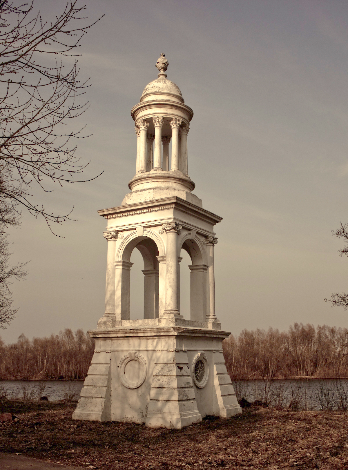 Беларуская (тарашкевіца): Палацава-паркавы ансамбль: палац, фантан, гаспадарчыя і вытворчыя пабудовы, альтанка, парк. г. Нароўля This is a photo of Belarusian heritage monument. Reference number: 312Г000536 ( WLM)